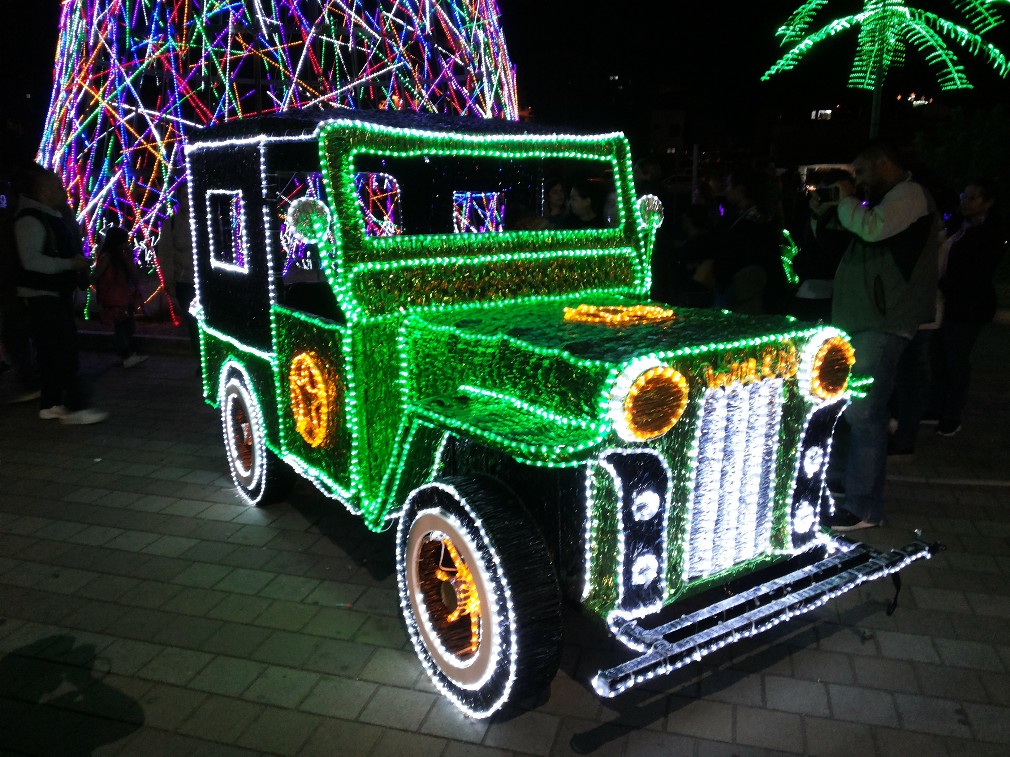 Alumbrados navideños 2018 en Marinilla, Antioquia, Colombia.